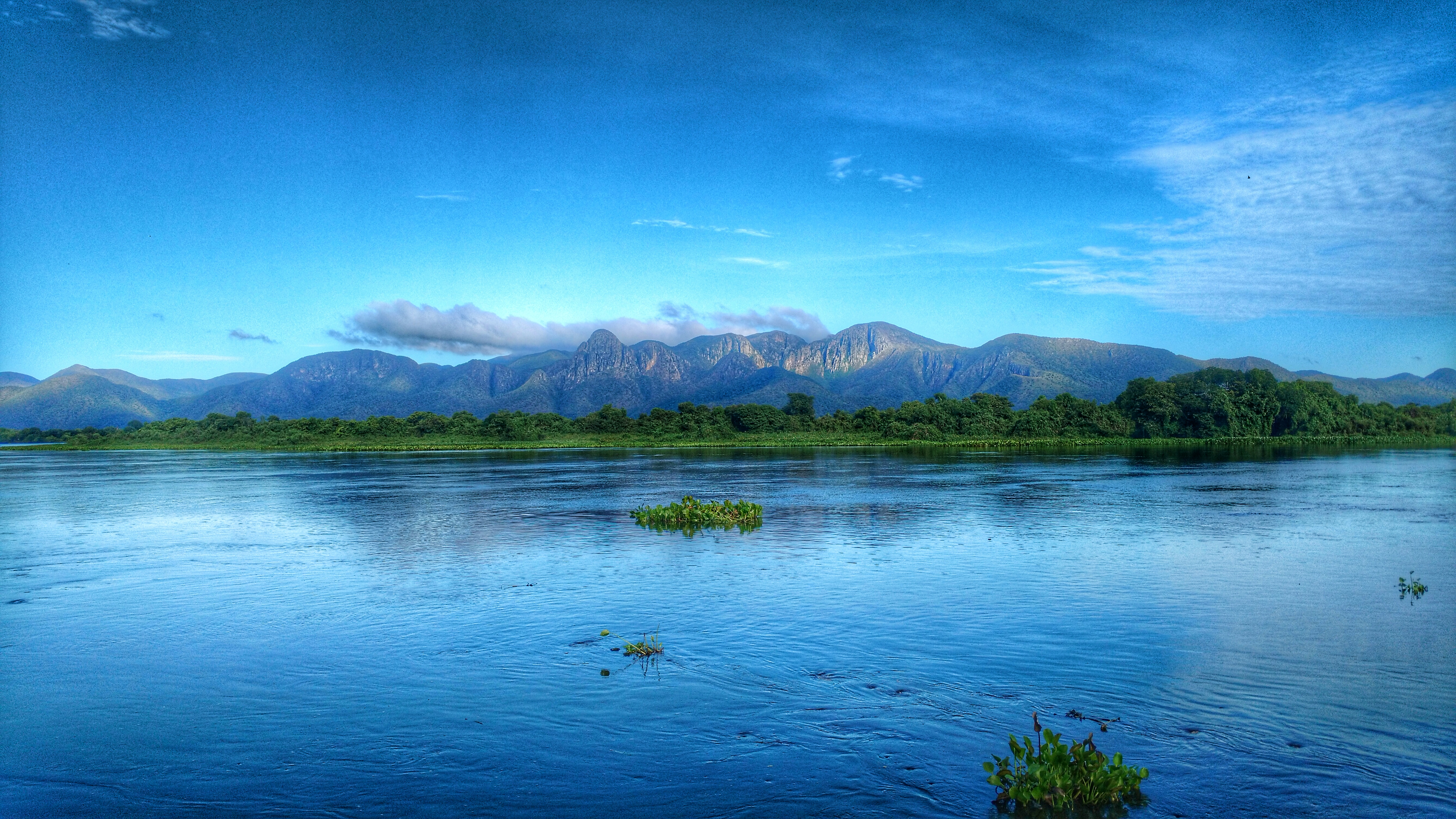 Cadeia de montanhas meio ao pantanal.